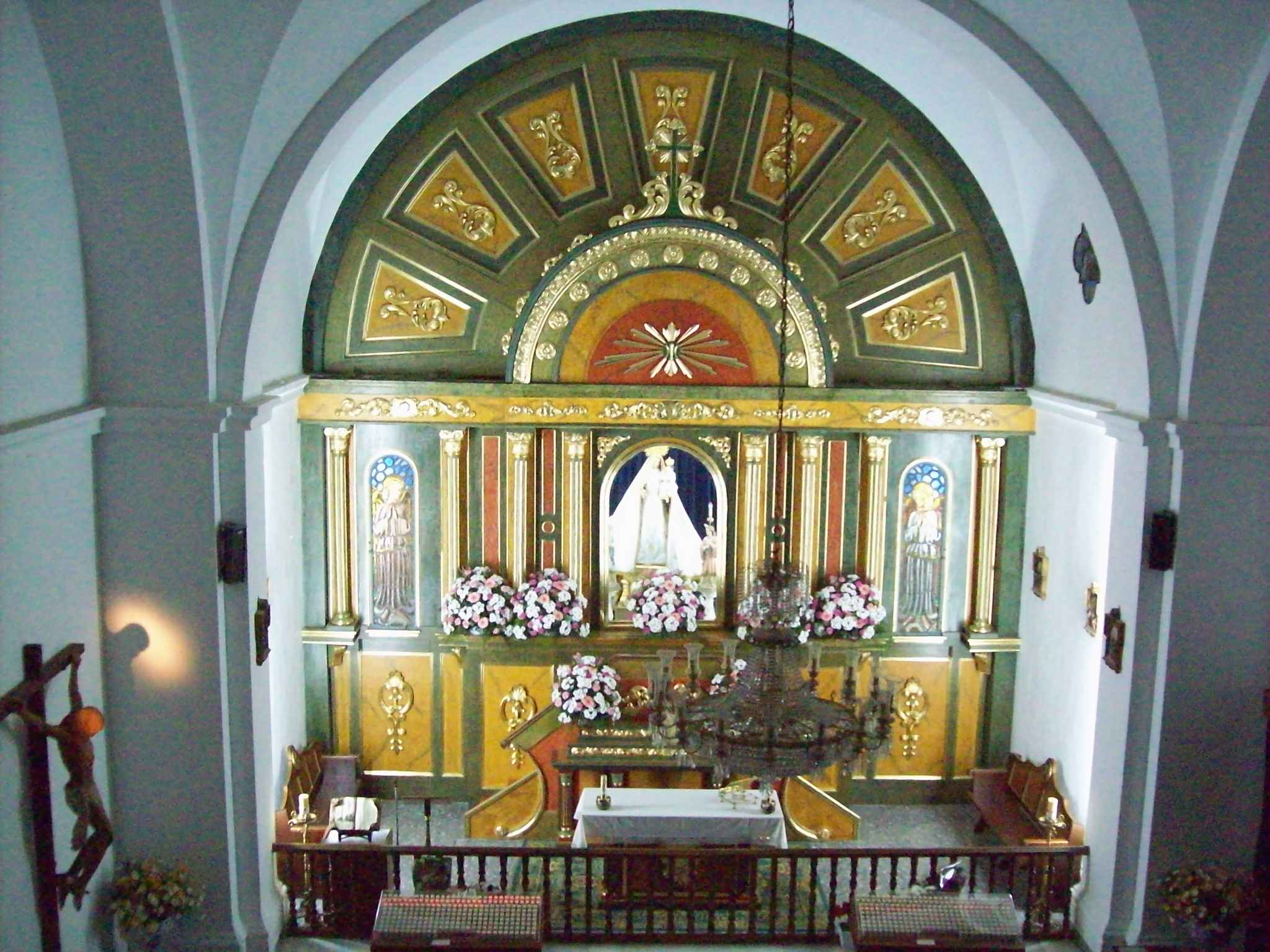 Virgem dos Remédios -Valencia de Alcantara/Cáceres